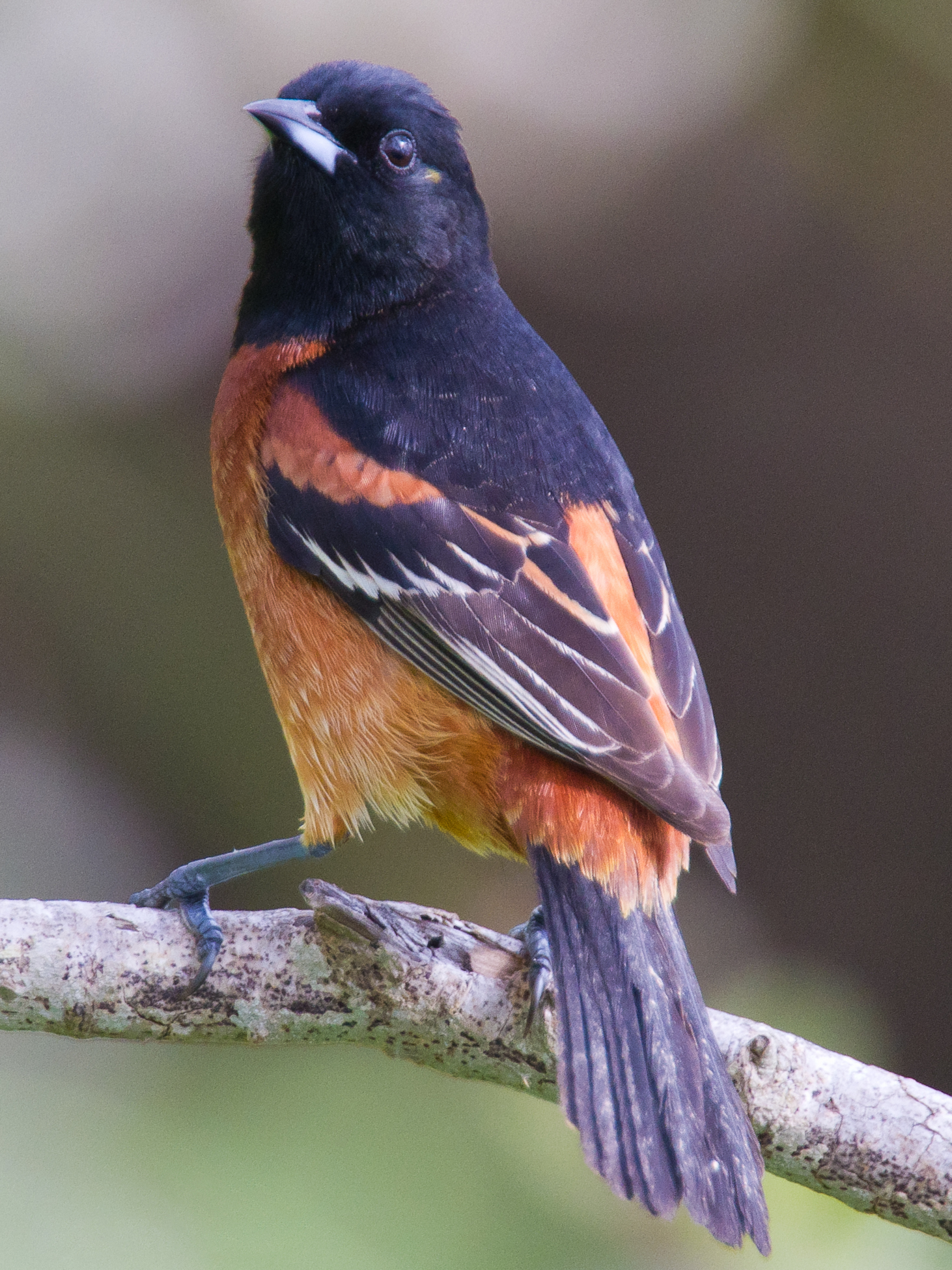 Orchard Oriole